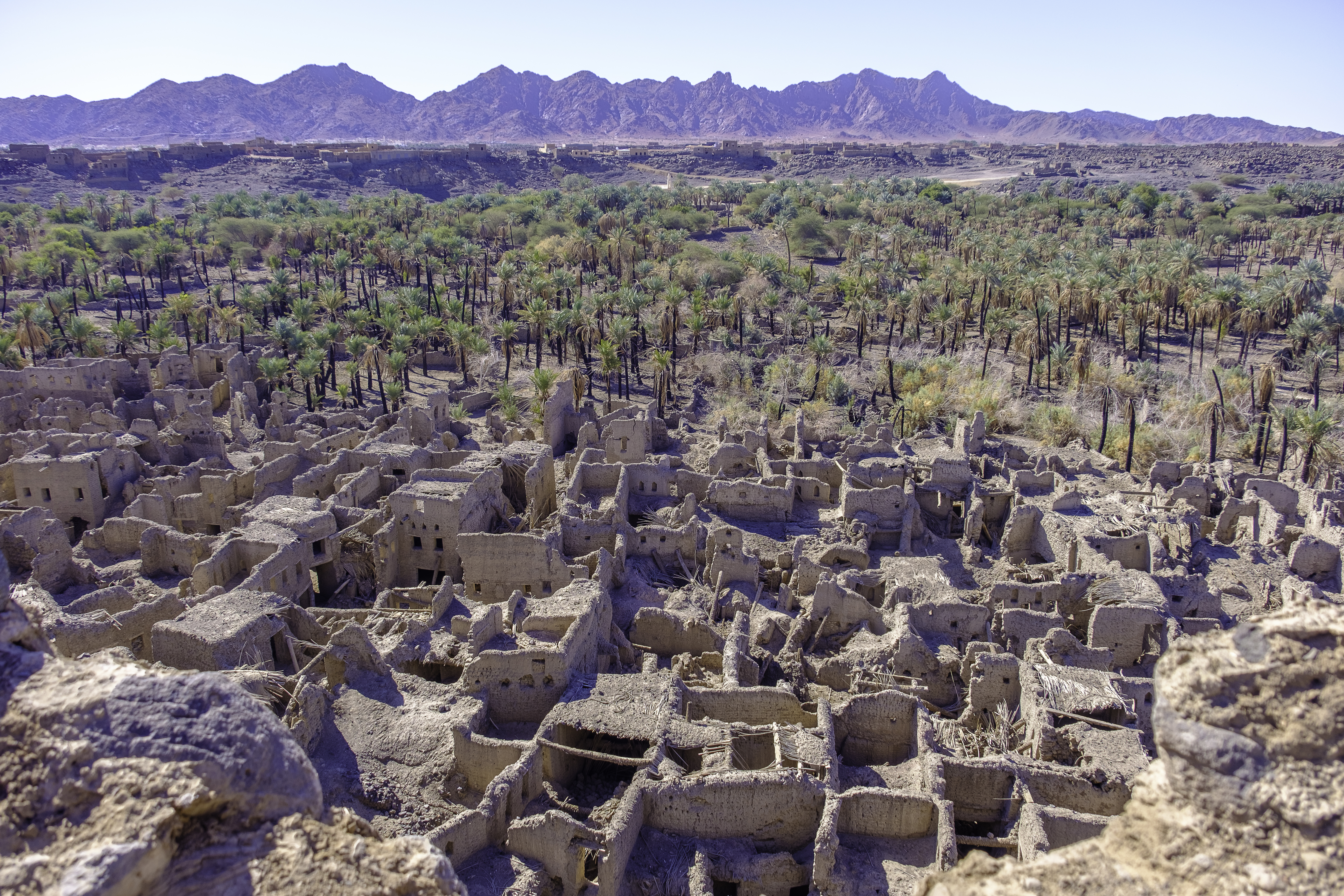 Verlaten huizen in de joodse plaat Khaybar